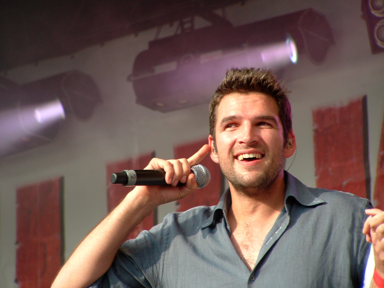 Roel Vanderstukken tijdens Flikkendag 2007 in Gent.